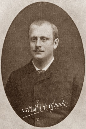 Stanilas de Guaïta à dix-neuf ans. Photographie publiée dans l'ouvrage de Maurice Barrès, Un rénovateur de l'occultisme. Stanislas de Guaita (1861-1898), Paris, Chamuel, 1898 [1].